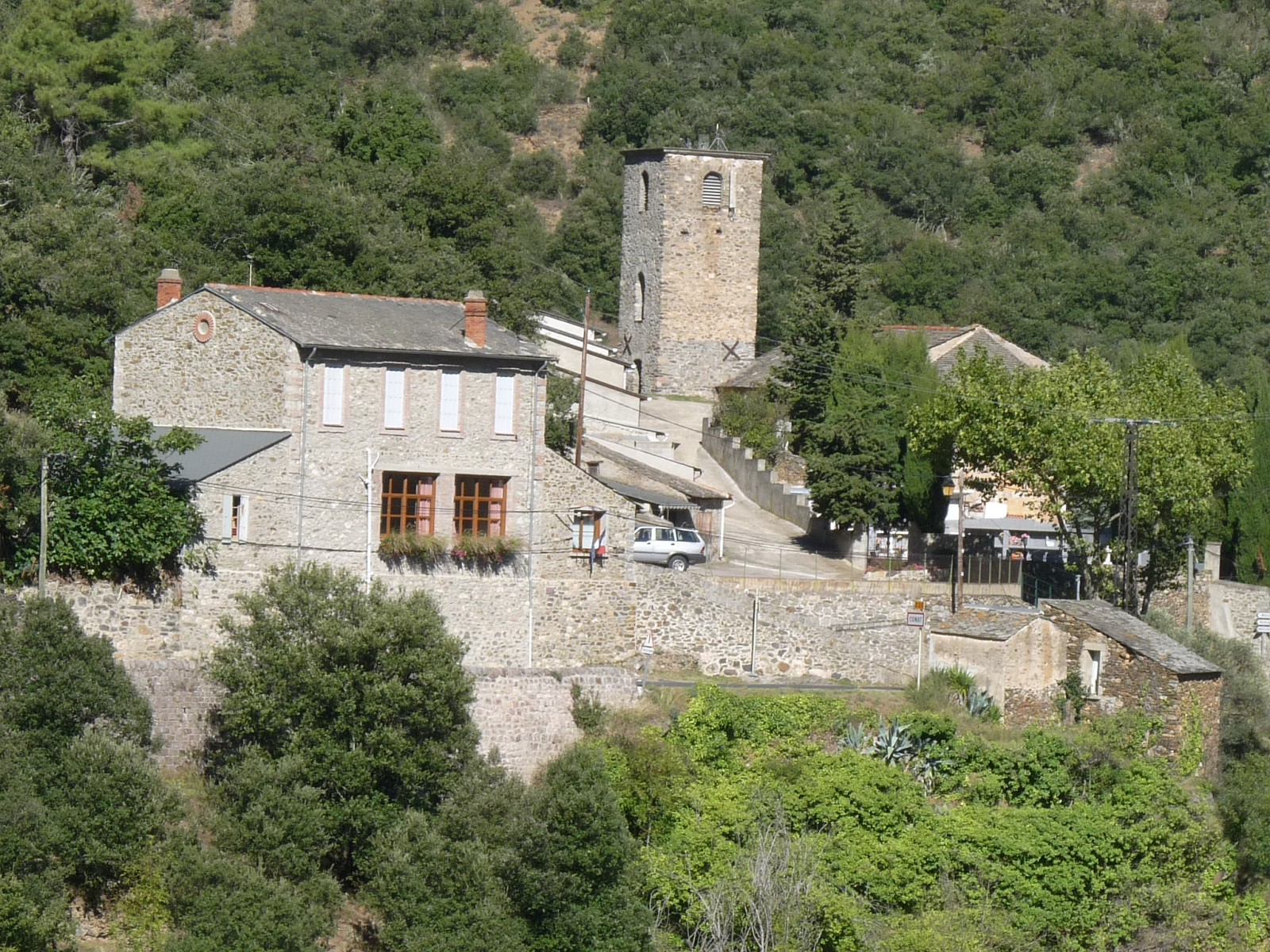 Eglise St-Jean, Conat, Pyrénées-Orientales, France